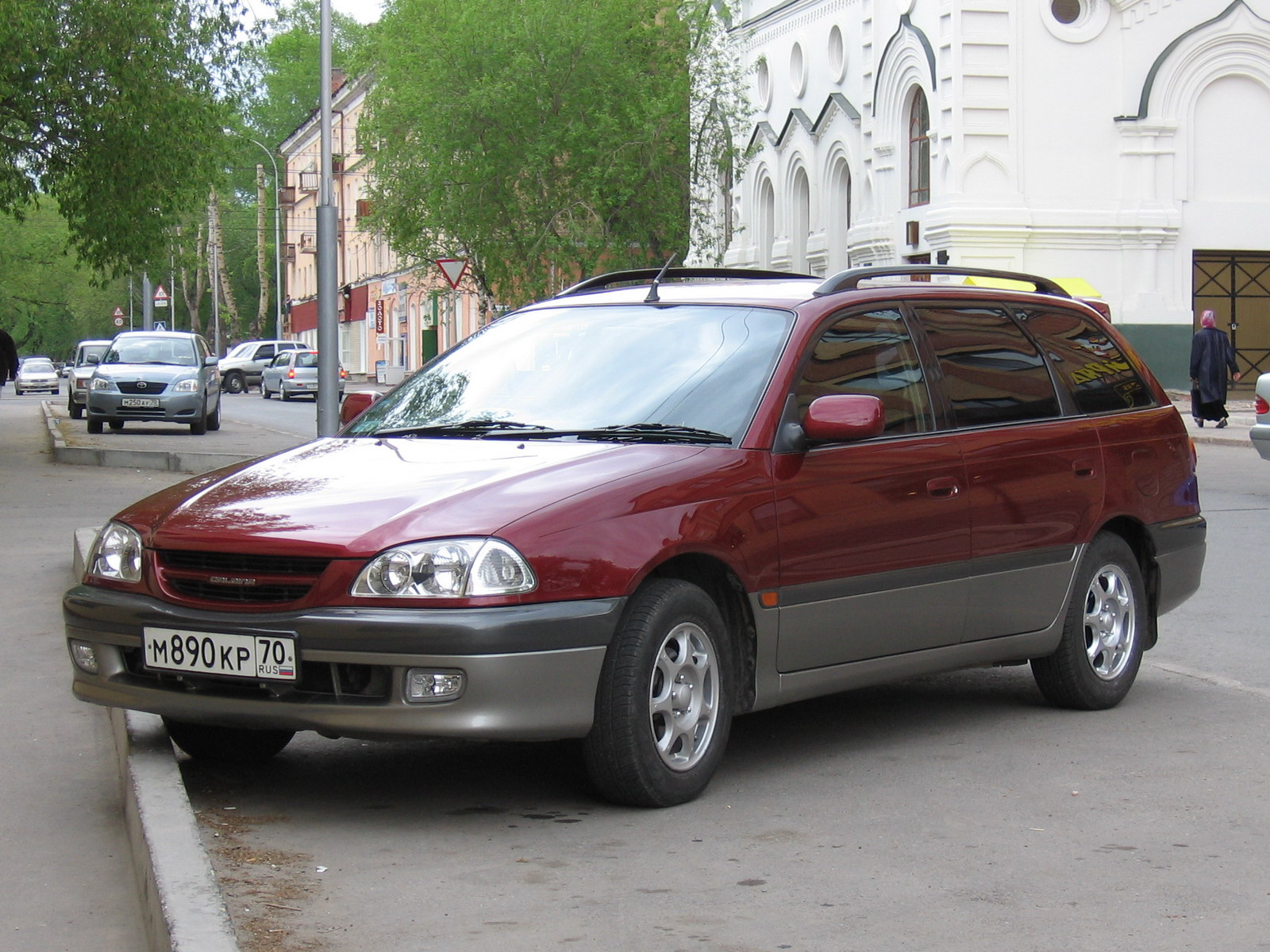 Photo taken in Tomsk, Russia